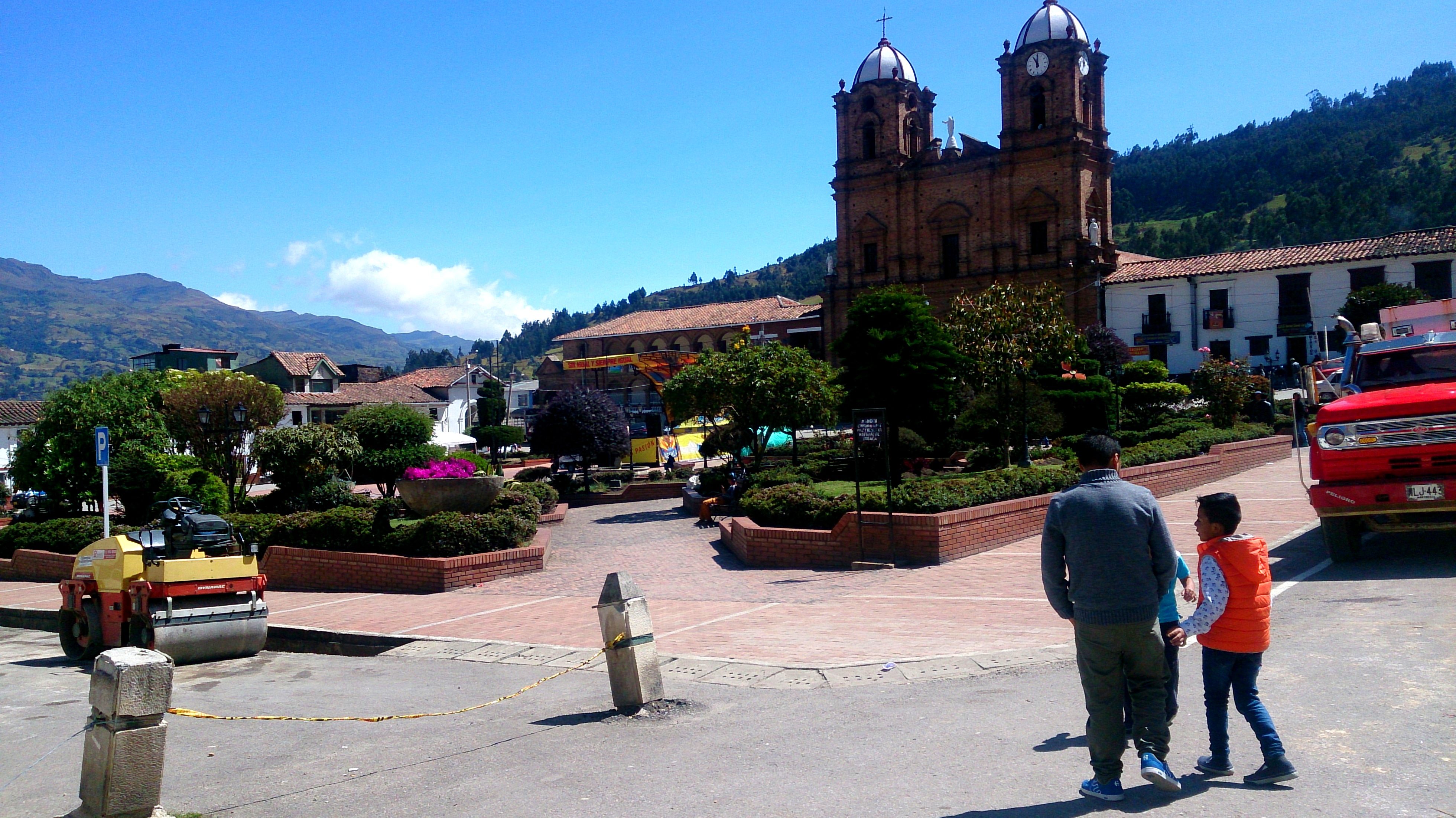 Esta fotografía fue tomada en el municipio colombiano con código 15464.